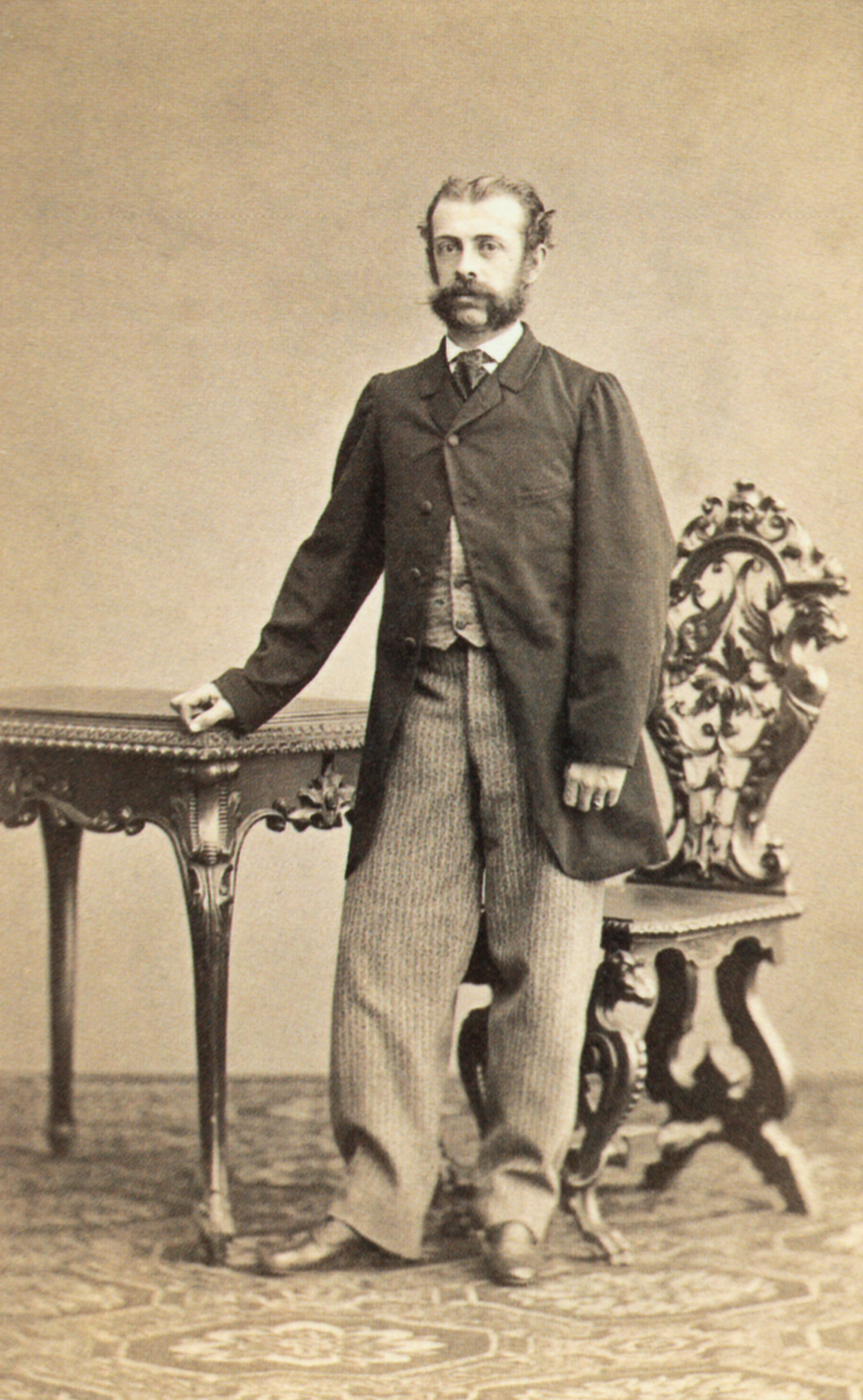 Adalbert Wunderlich